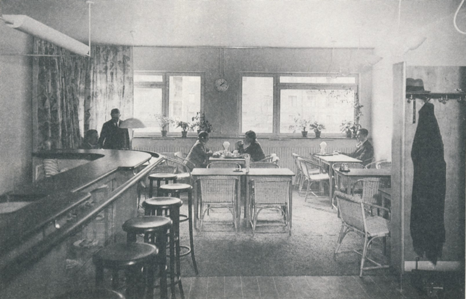 Sven Markelius' kollektivhus vid John Ericssonsgatan 6, Kungsholmen